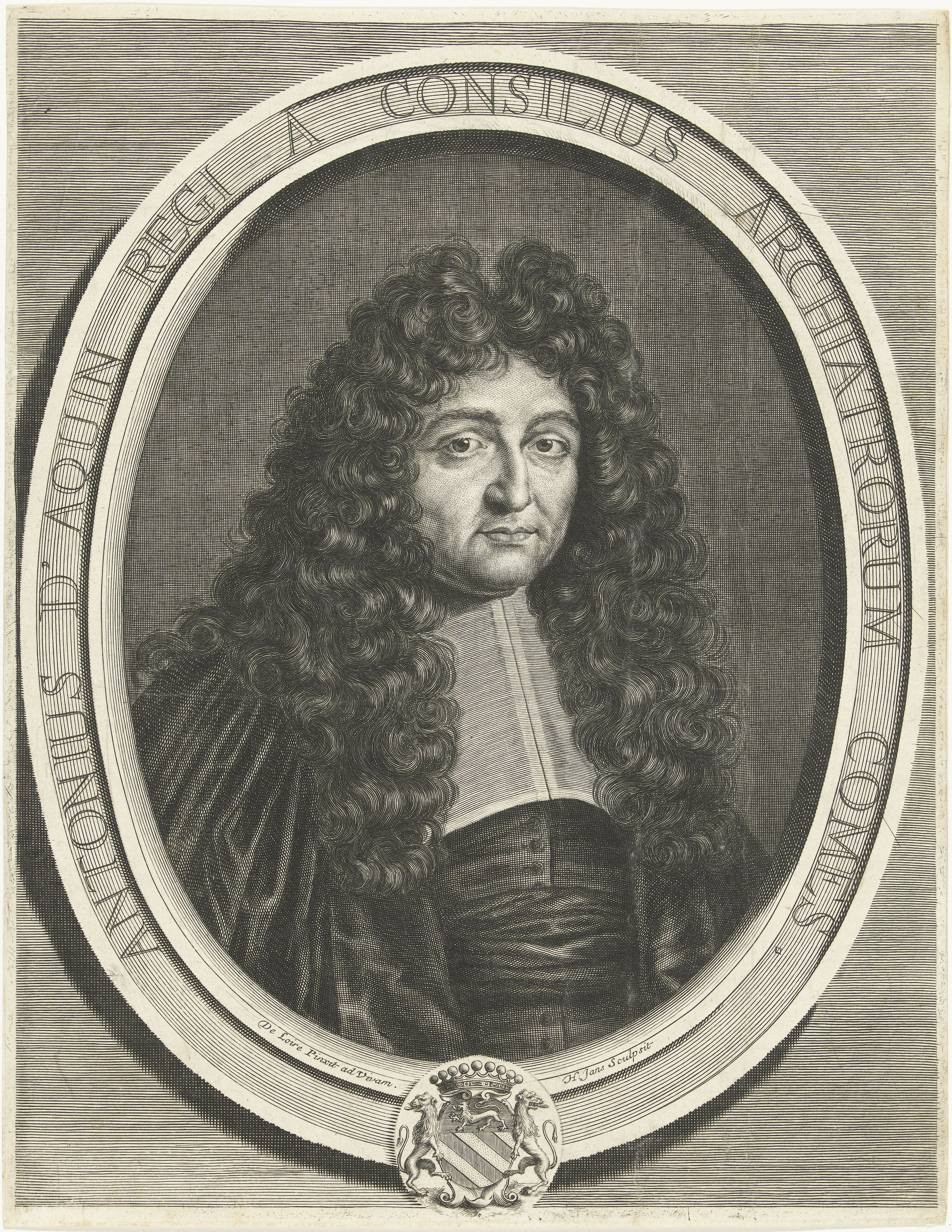 IdentificatieTitel(s): Portret van Antonius d'AquinObjecttype: prent Objectnummer: RP-P-1895-A-18874Opschriften / Merken: verzamelaarsmerk, verso, gestempeld: Lugt 2228opschrift, verso middenboven, handgeschreven in bruine inkt: ‘1592’Omschrijving: Portret van Antonius d'Aquin in toga. In het randschrift van de omlijsting zijn naam en functie in het Latijn en zijn familiewapen.VervaardigingVervaardiger: prentmaker: Hendrik Jansens (vermeld op object)naar schilderij van: De Loire (vermeld op object)Plaats vervaardiging: AmsterdamDatering: 1673Fysieke kenmerken: gravureMateriaal: papier Techniek: graveren (drukprocedé)Afmetingen: blad: h 330 mm × b 256 mmOnderwerpWie: Antonius d'AquinVerwerving en rechtenVerwerving: aankoop nov-1895Copyright: Publiek domein